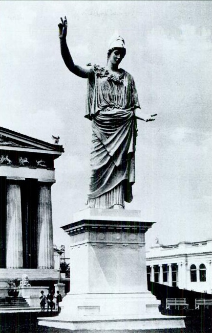 Gigantesca estatua da Atena de Velletri esculpida por Enid Yandell.